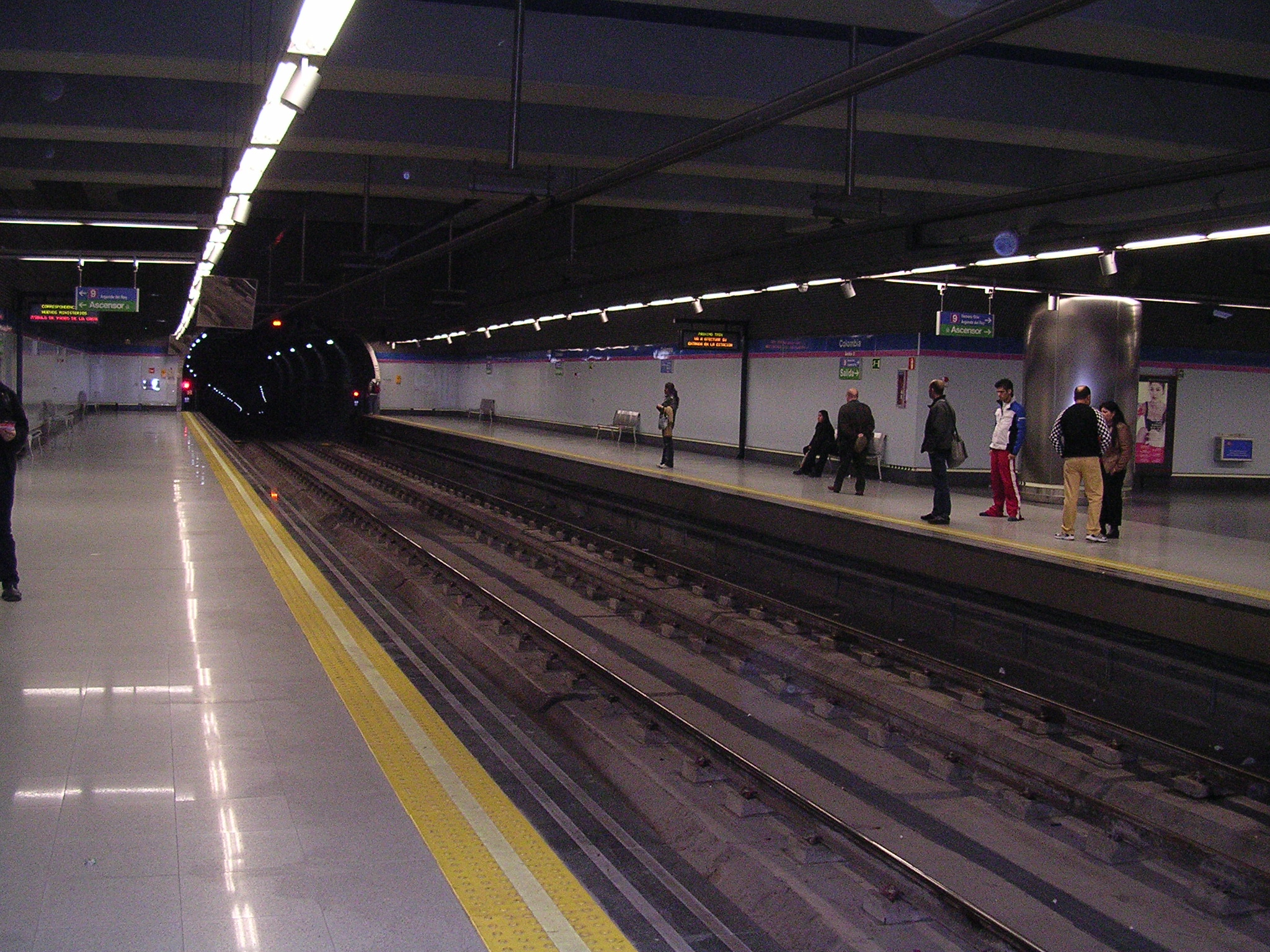 Metro de Madrid. Estación Colombia linea 9